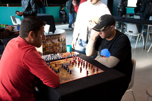 Jeu de société Stratego